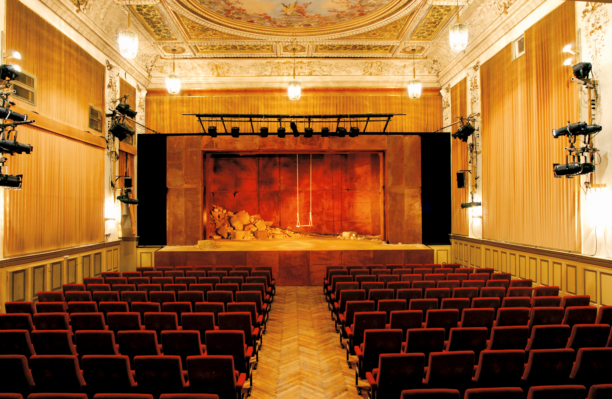 Auditorium des Vienna's Englisch Theatre